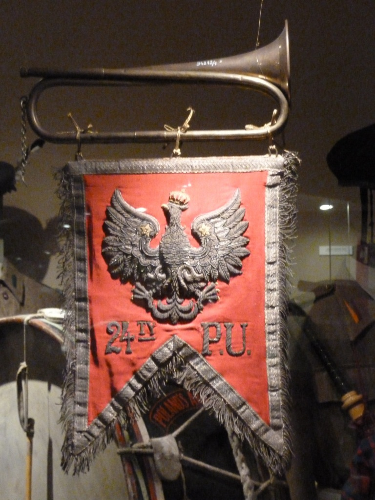 Trąbka 24 Pułku Ułanów w Polskich Siłach Zbrojnych - Muzeum Wojska Polskiego w Warszawie